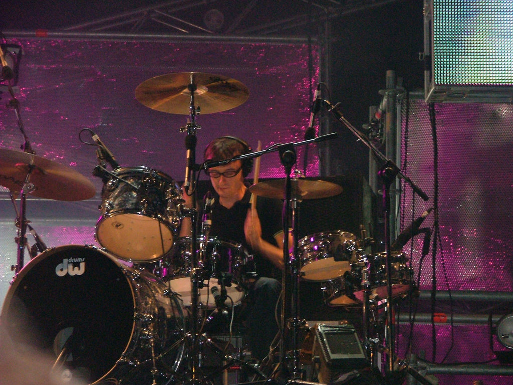 Subsonica live a Castagnole delle Lanze (AT) 31 agosto 2005